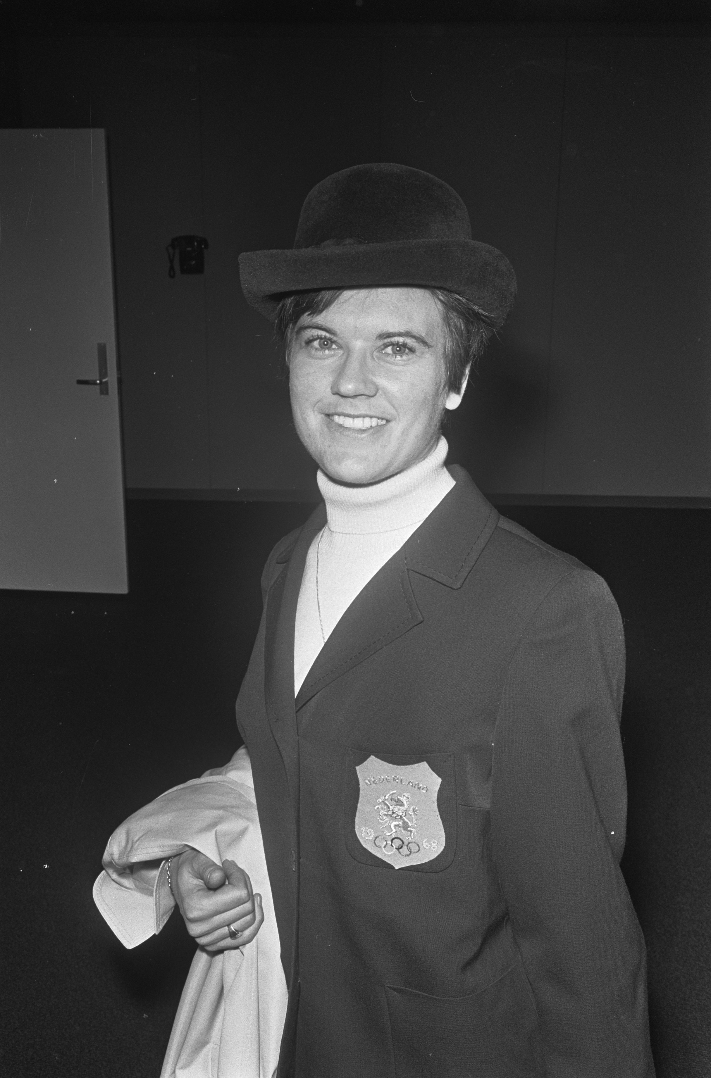 Collectie / Archief : Fotocollectie Anefo Reportage / Serie : [ onbekend ] Beschrijving : Damesschaatsploeg naar Davos, Stien Kaiser in Olympisch kleding Datum : 29 januari 1968 Locatie : Davos Trefwoorden : Dames, schaatsploegen Persoonsnaam : Kaiser, Stien Fotograaf : Koch, Eric / Anefo Auteursrechthebbende : Nationaal Archief Materiaalsoort : Negatief (zwart/wit) Nummer archiefinventaris : bekijk toegang 2.24.01.05 Bestanddeelnummer : 921-0314